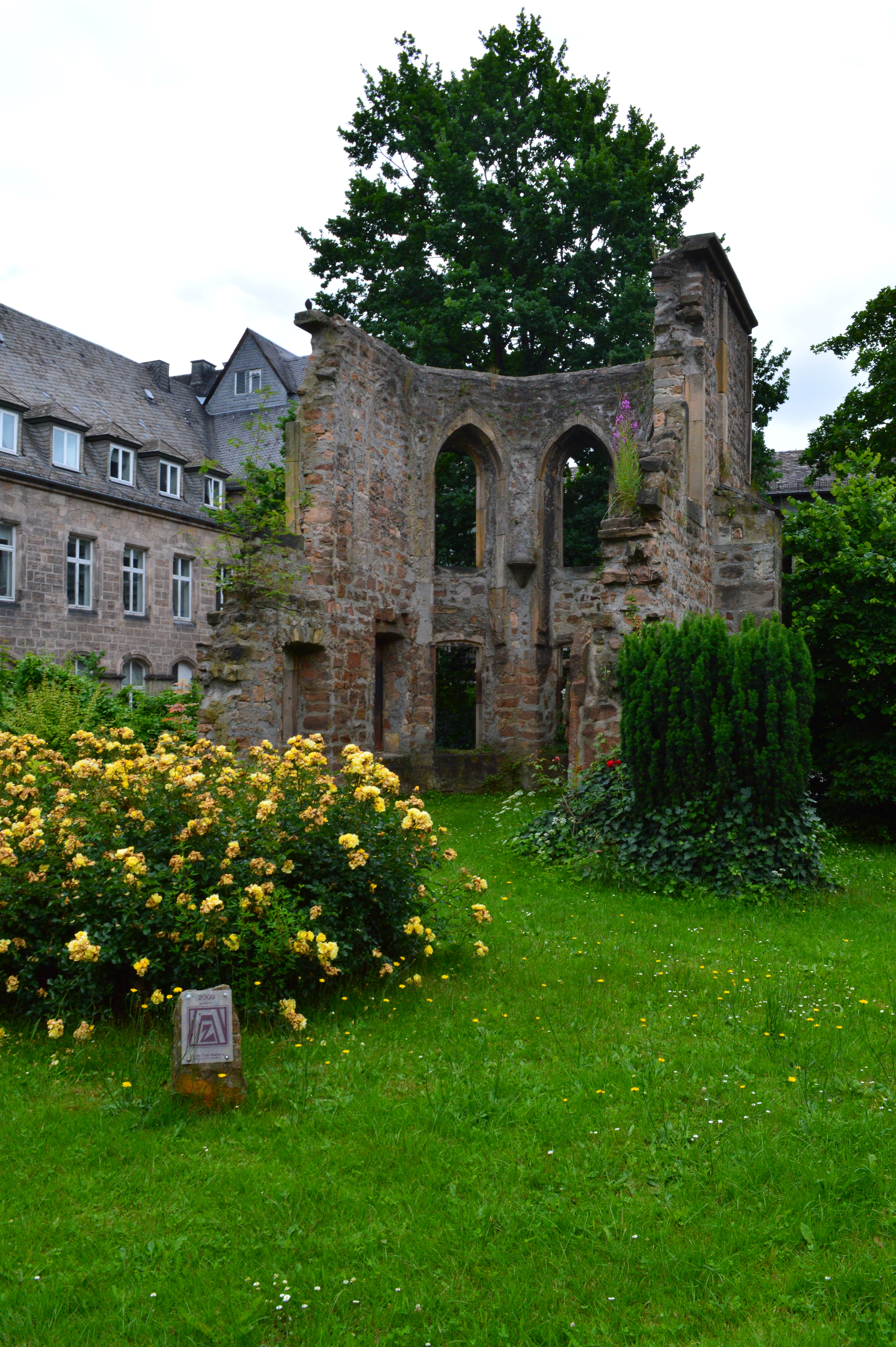 Ruine des Elisabeth-Hospitals in Marburg